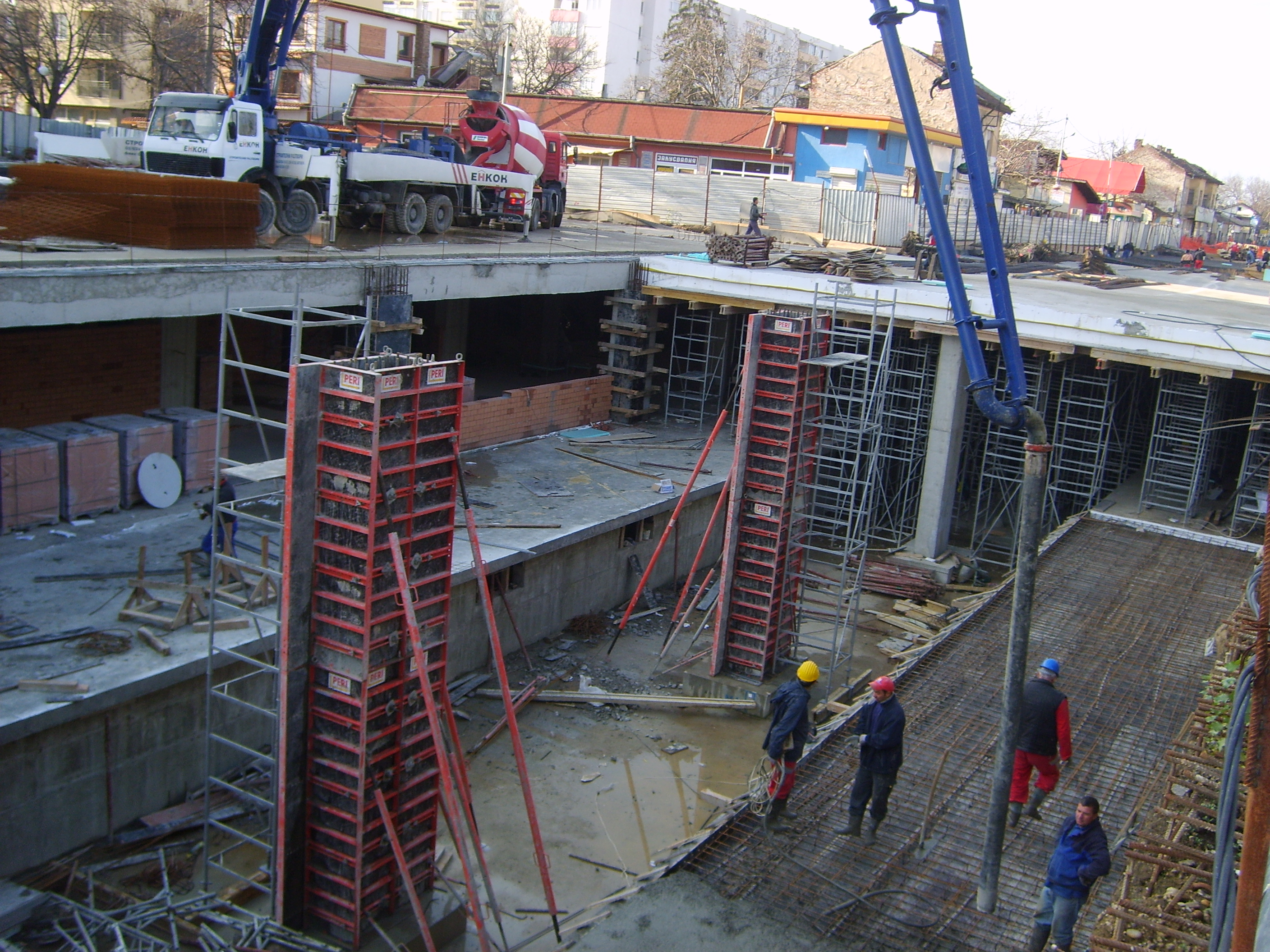 Строителство на Метростанция Надежда